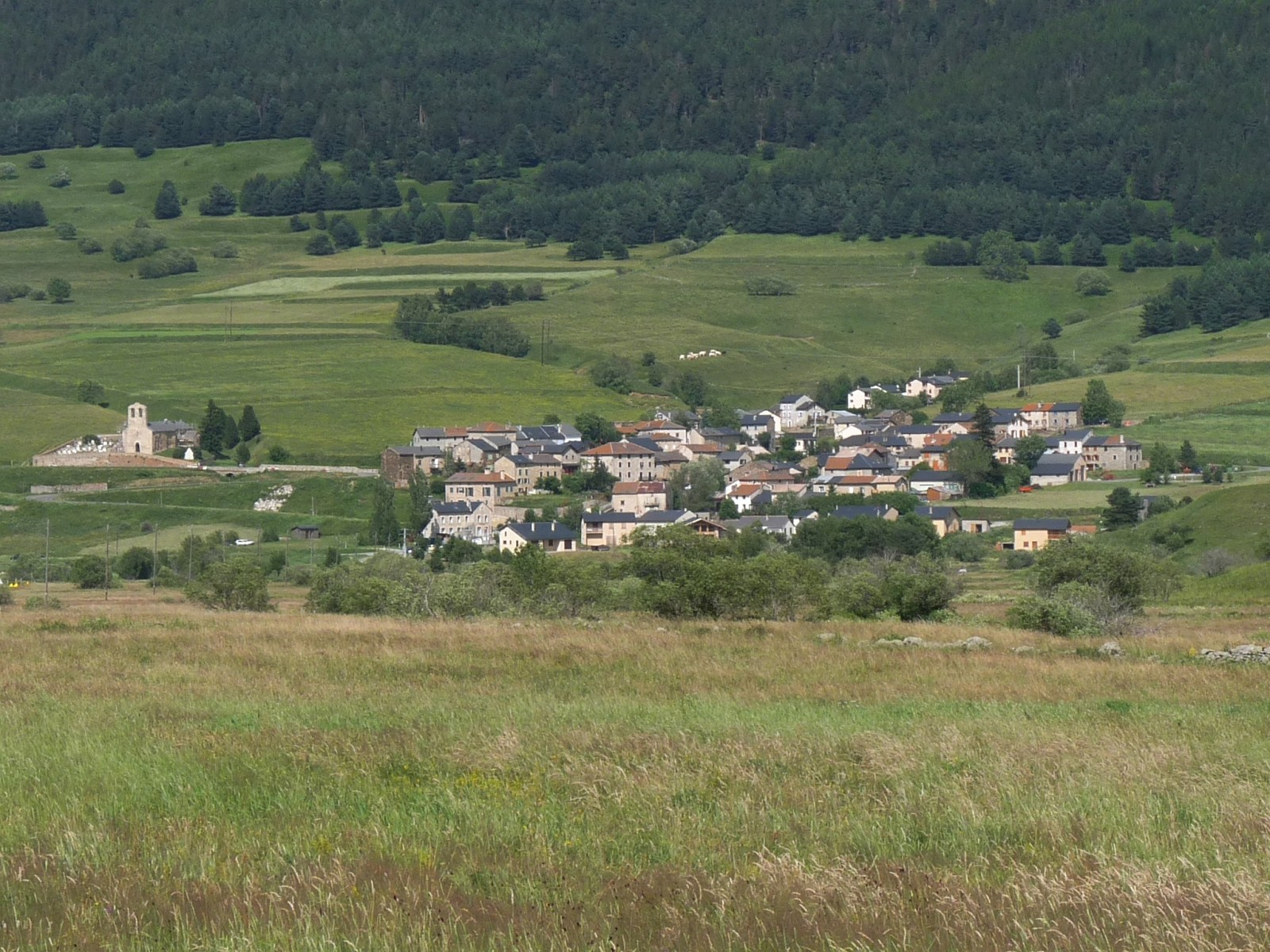 Réal (vue de l'ouest), Pyrénées-Orientales, France